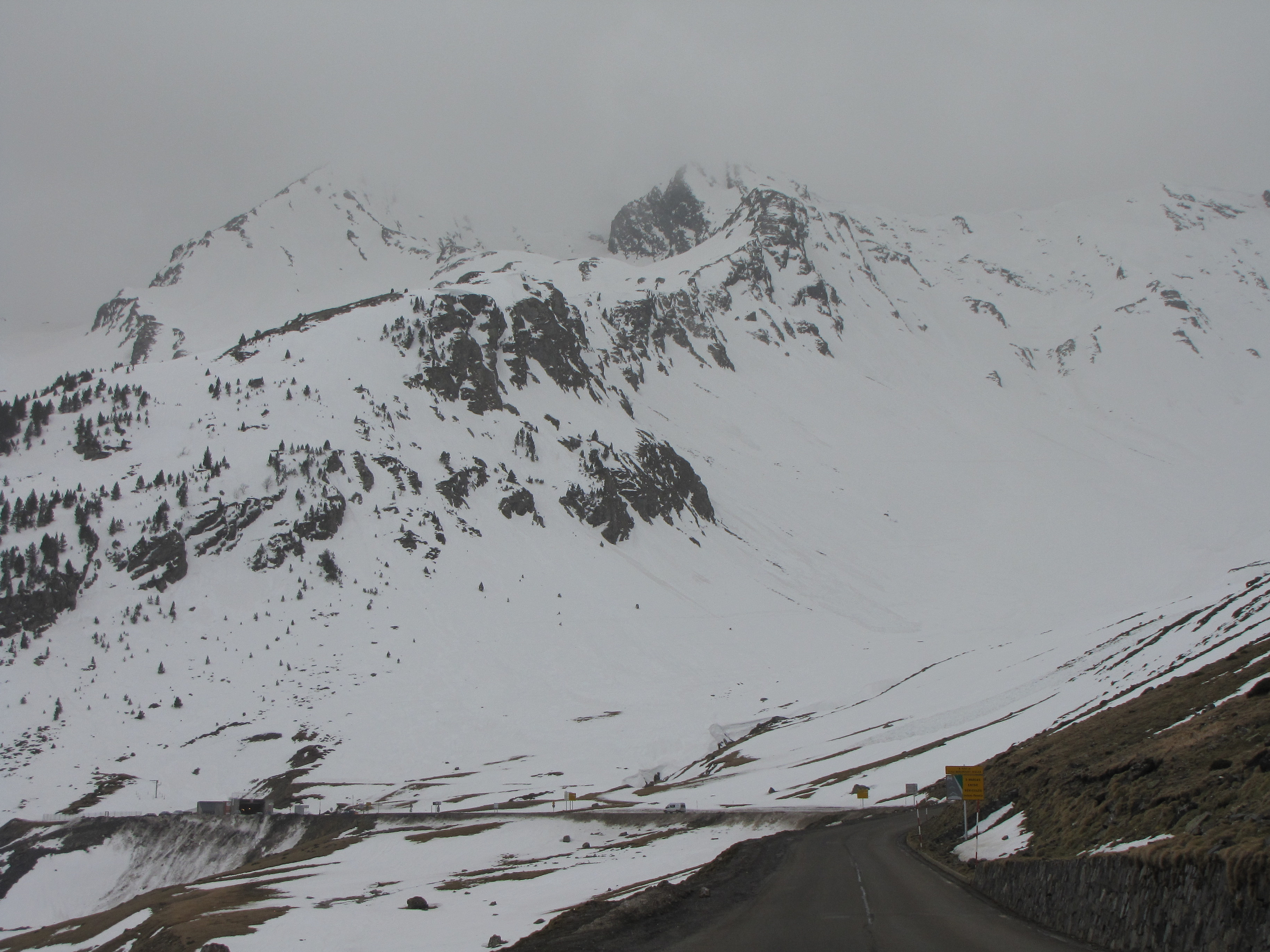 Entrée du tunnel Aragnouet-Bielsa coté français